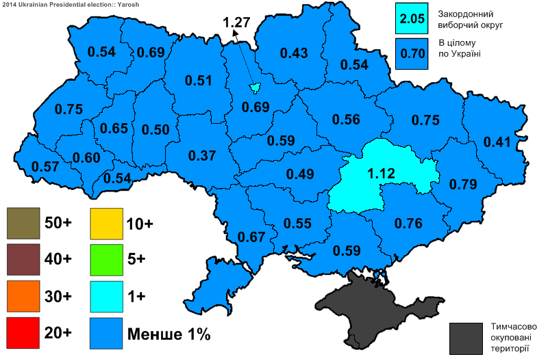 Електоральна підтримка Яроша Дмитра Анатолійовича на виборах Президента України 2014.